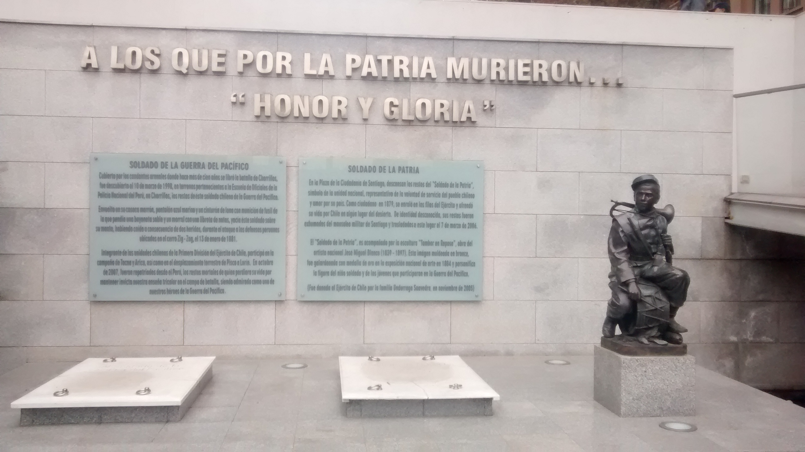 Tumba del soldado desconocido y del soldado de la guerra del pacifico.